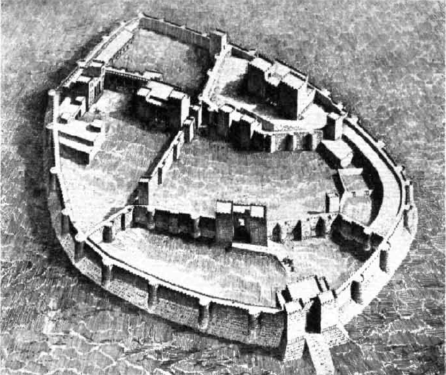 Burg von Sendschirli, ergänzt